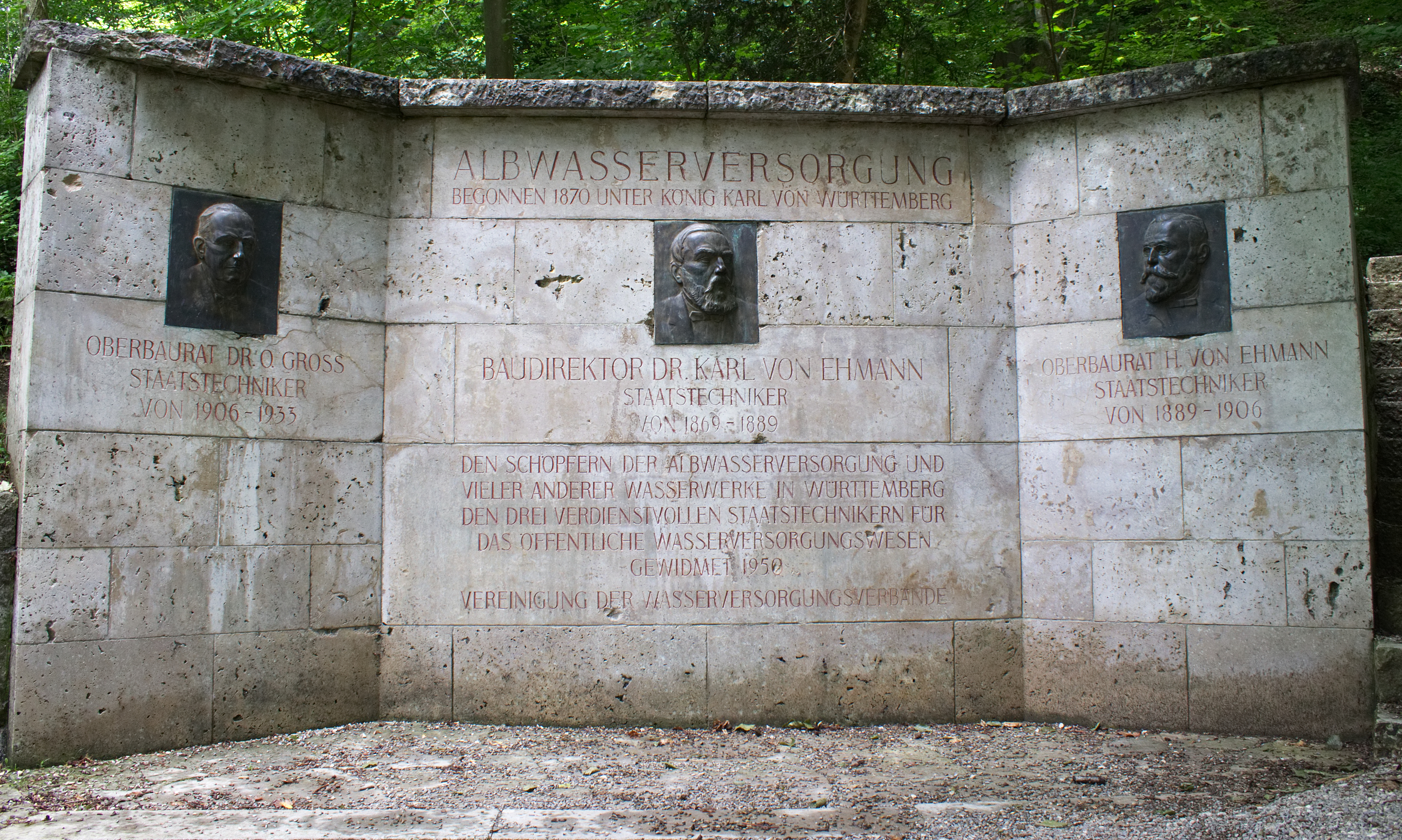 Denkmal für die maßgeblichen Ingenieure der Albwasserversorgung. Errichtet 1950 nahe dem Blautopf.